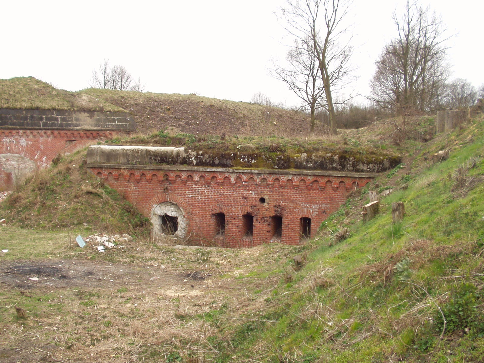 Schron obrony wjazdy w Forie XII Twierdzy Toruń